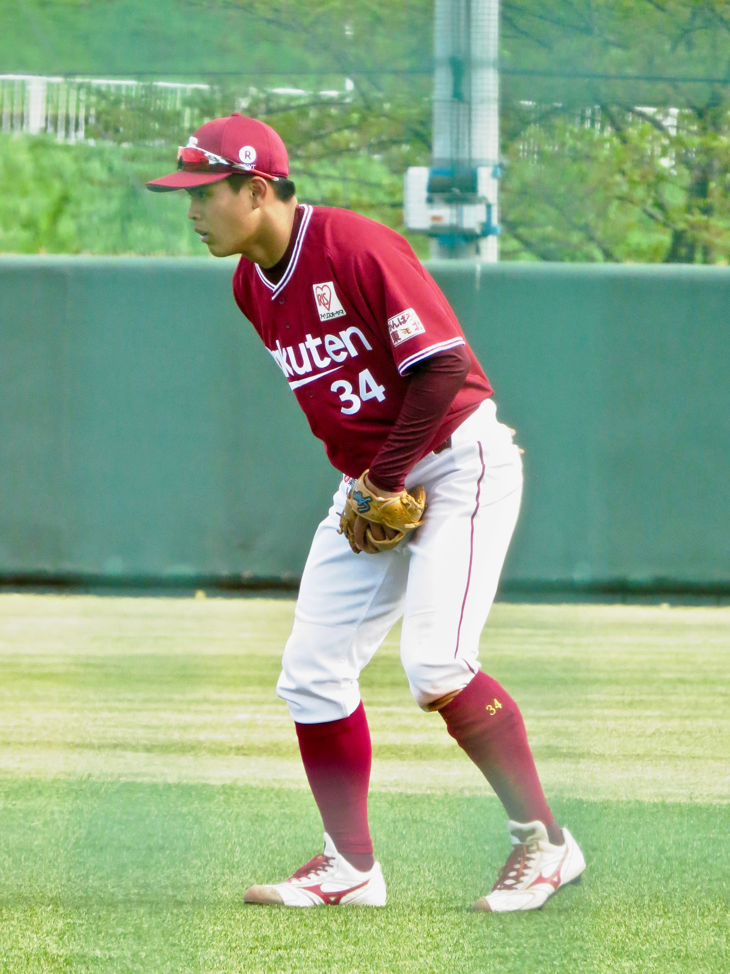 東北楽天ゴールデンイーグルスの選手「山﨑剛」。ヤクルト戸田球場にて。